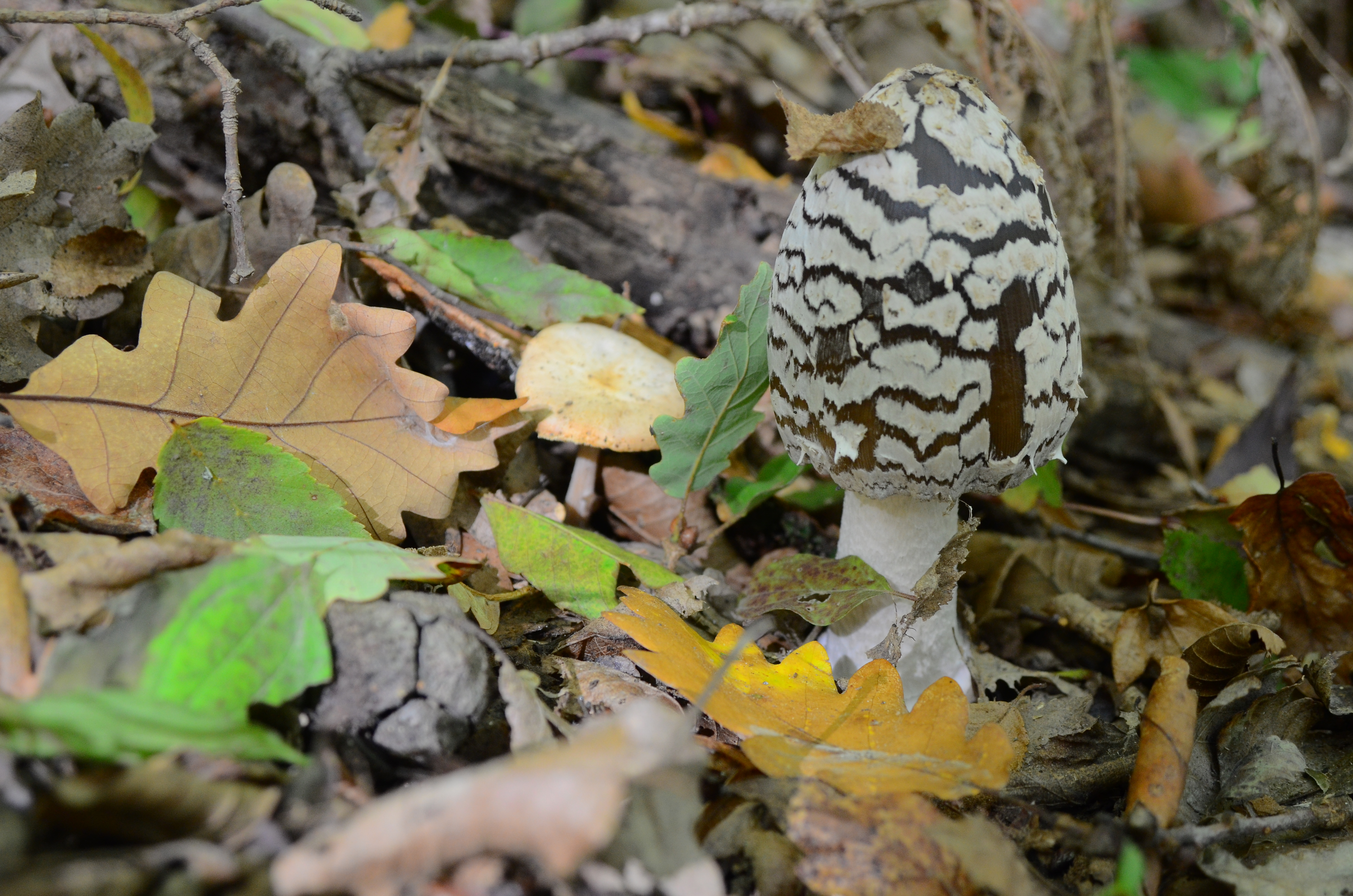 Крым.